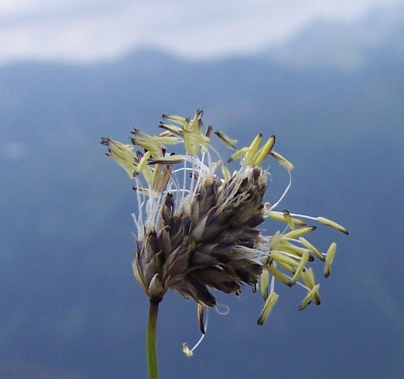 Oreochloa disticha (pl. boimka dwurzędowa), habitat: West Tatra Mountains, Hala Upłaz